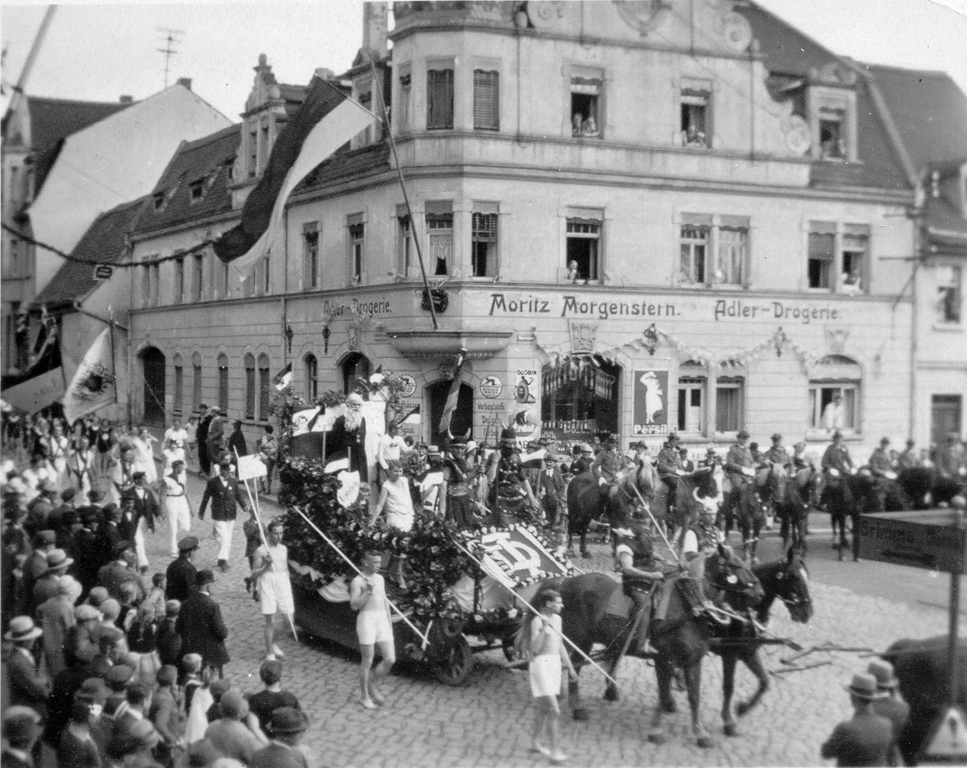 Röthaer Markt im Sommer 1930 (75-Jahr-Feier des Gesangsvereins "Orpheus")